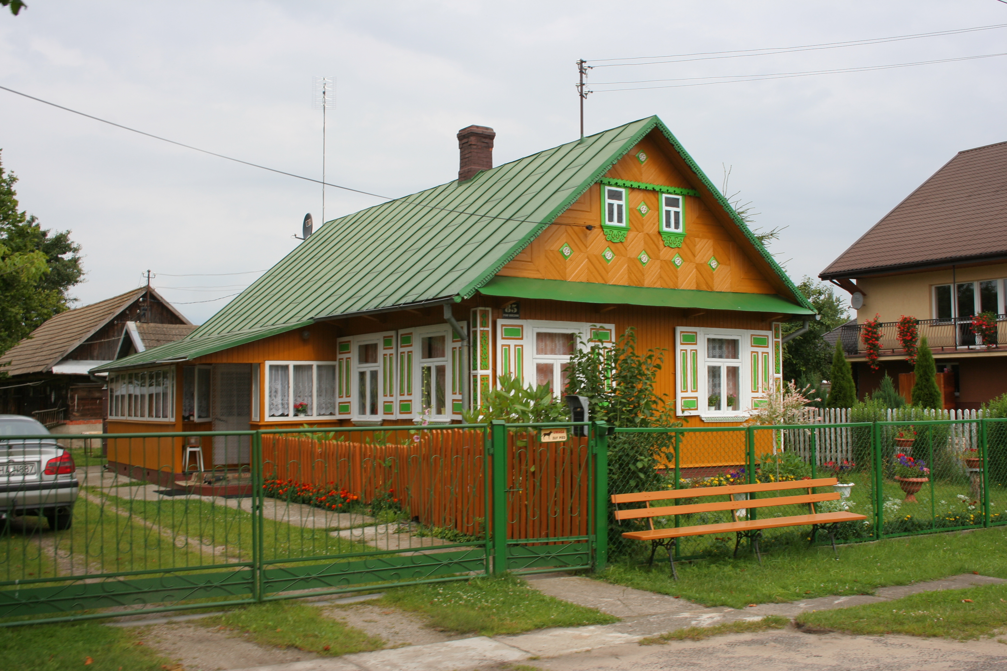 Dom mieszkalny w Starym Berezowie.